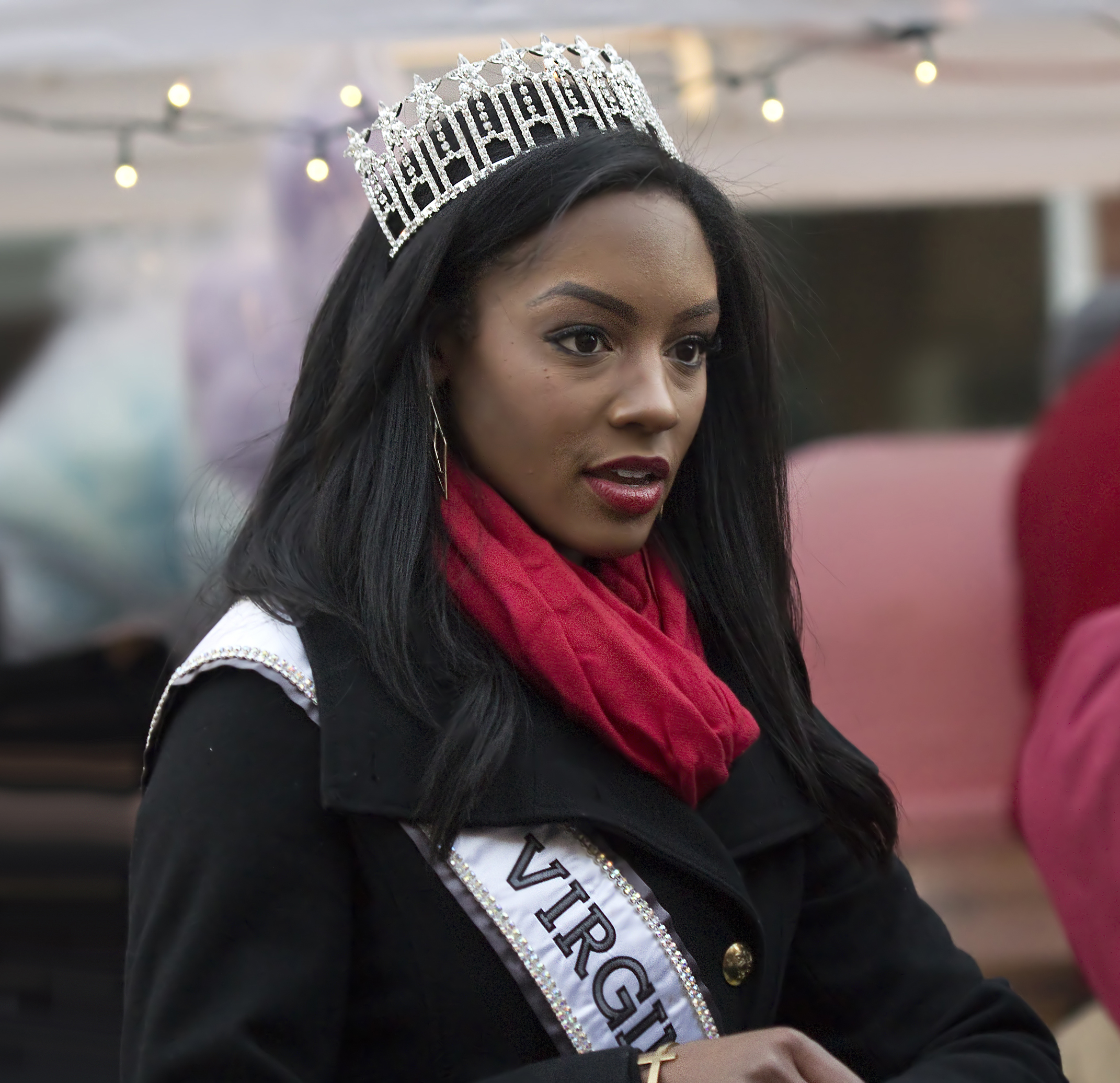 Miss Virginia 2013 & Miss Virginia USA 2016 Desiree Williams